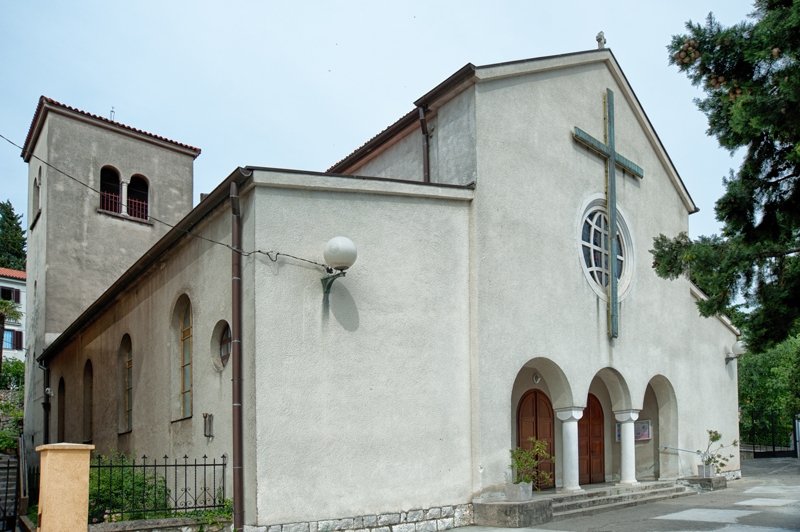 crkva Presvetog Srca Isusova časnih sestara sv. Križa na Sušaku u Rijeci